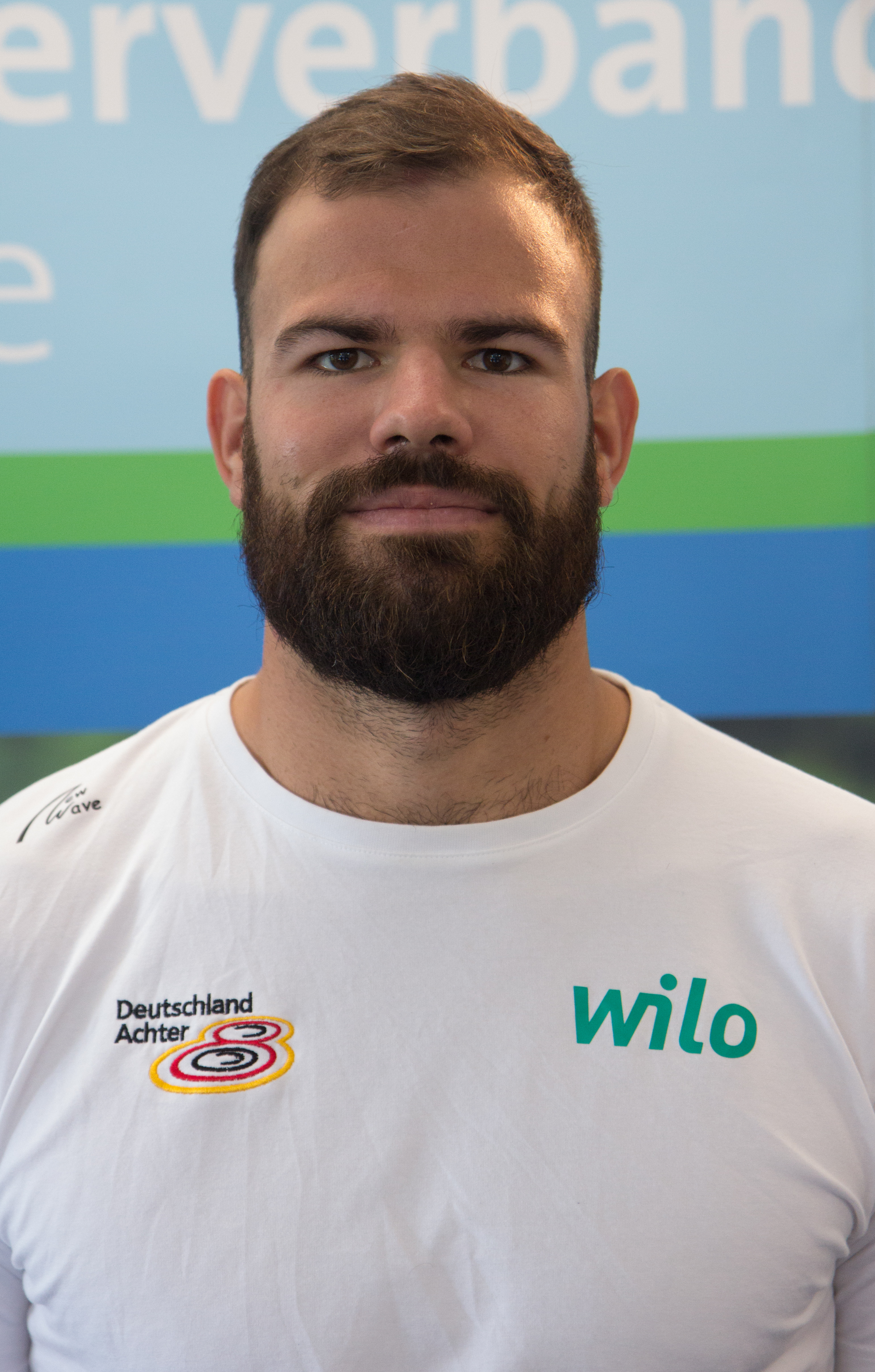 Medientag des Ruderverbandes in der Ruderakademie Ratzeburg am 6. September 2017: Maximilian Planer